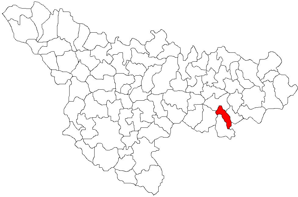 Categorie:Hărţi ale judeţului Timiş